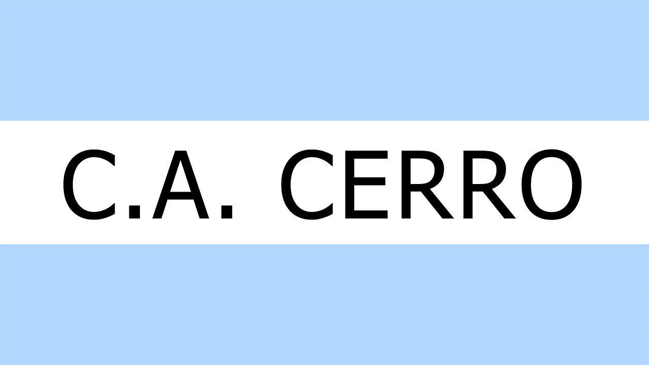 Bandera oficial del Club Atlético Cerro